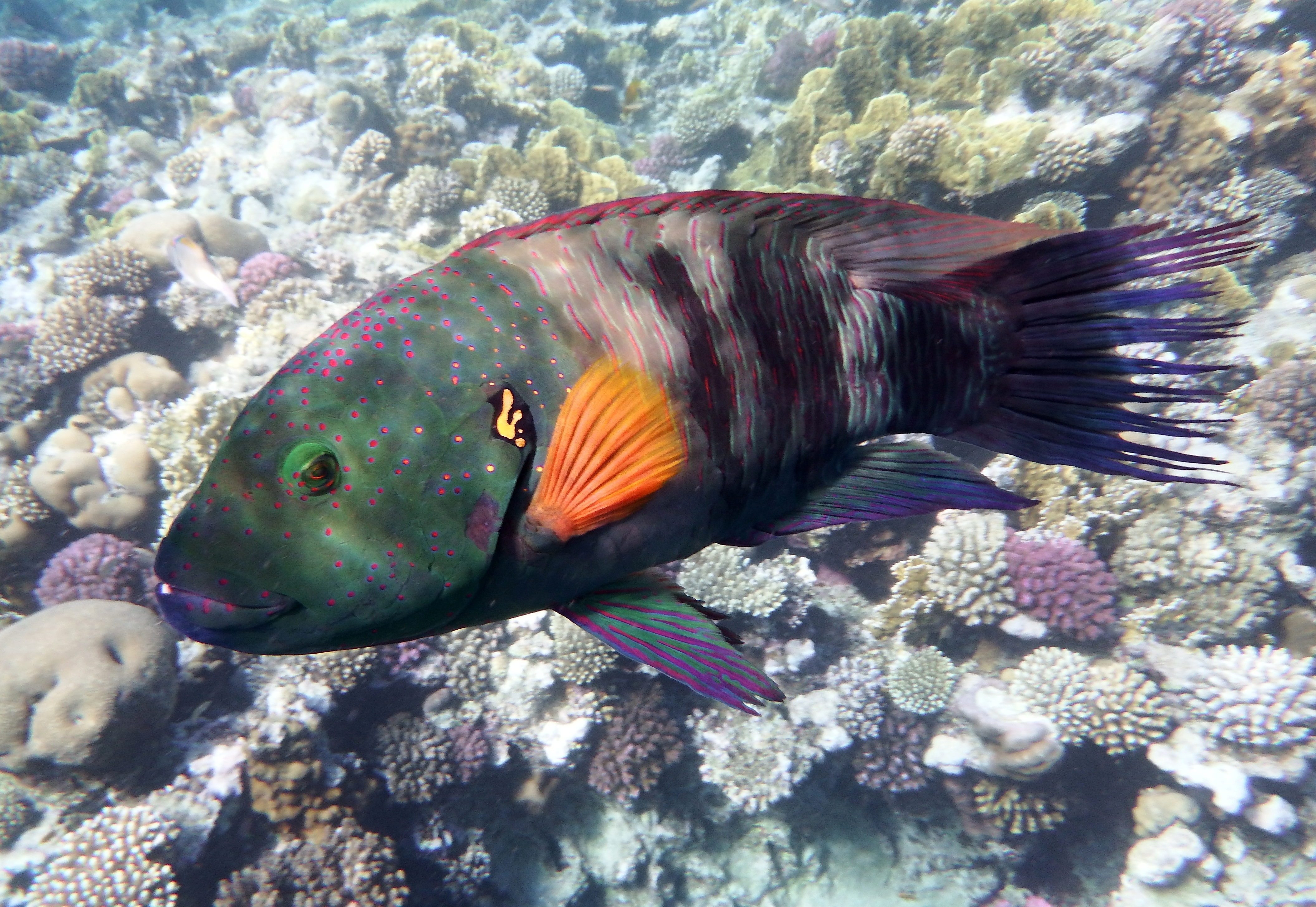 Fisch im Roten Meer. Broomtail wrasse, Cheilinus lunulatus. Video hier